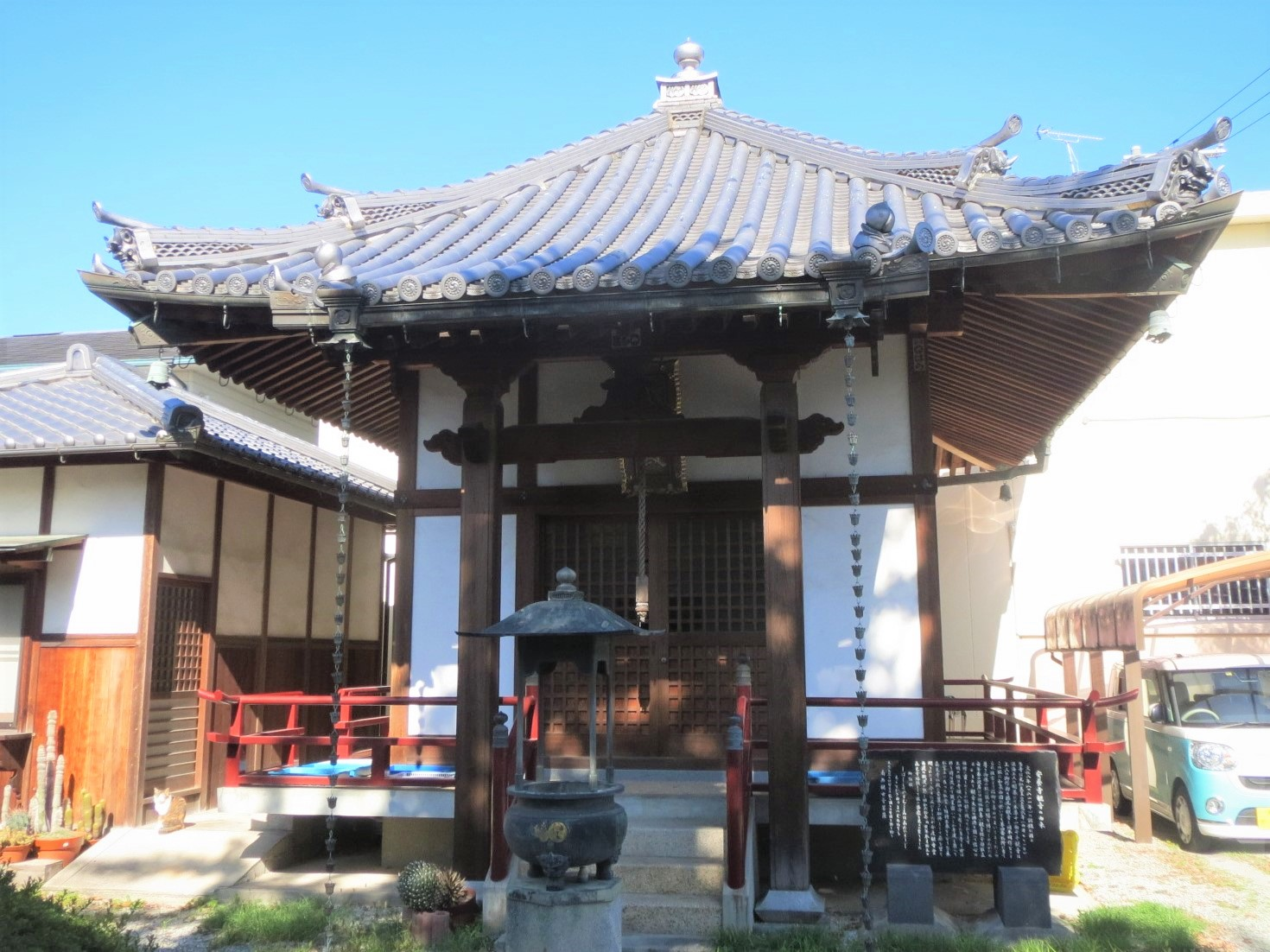 和泉市にある森光寺